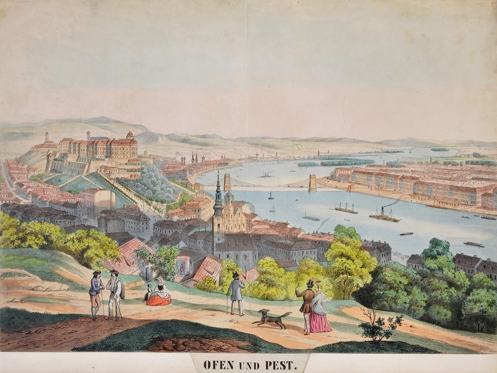 Buda és Pest látképe az új Lánchíddal